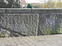 Goethebrunnen (Ilmenau): Das Zitat am Schöpfbrunnen